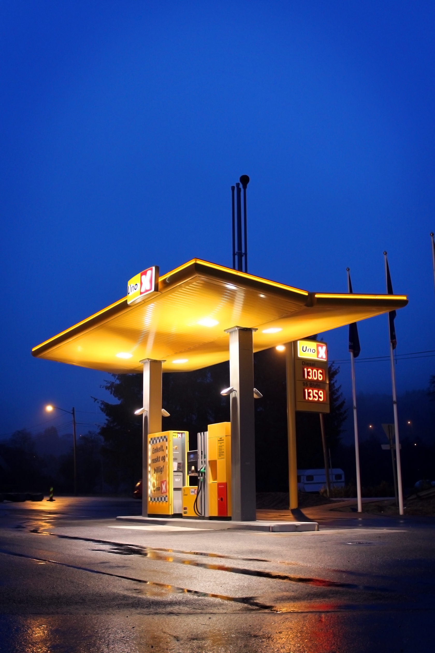 Et bilde av Uno-X Kvinesdal, en selvbetjent bensinstasjon i Uno-X Automat-kjeden.